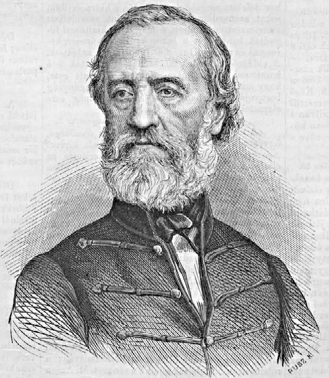 Perczel Mór (1811–1899) honvéd vezérőrnagy, országgyűlési képviselő. Rusz Károly metszete. (Vasárnapi Ujság, 1867. augusztus 25.)